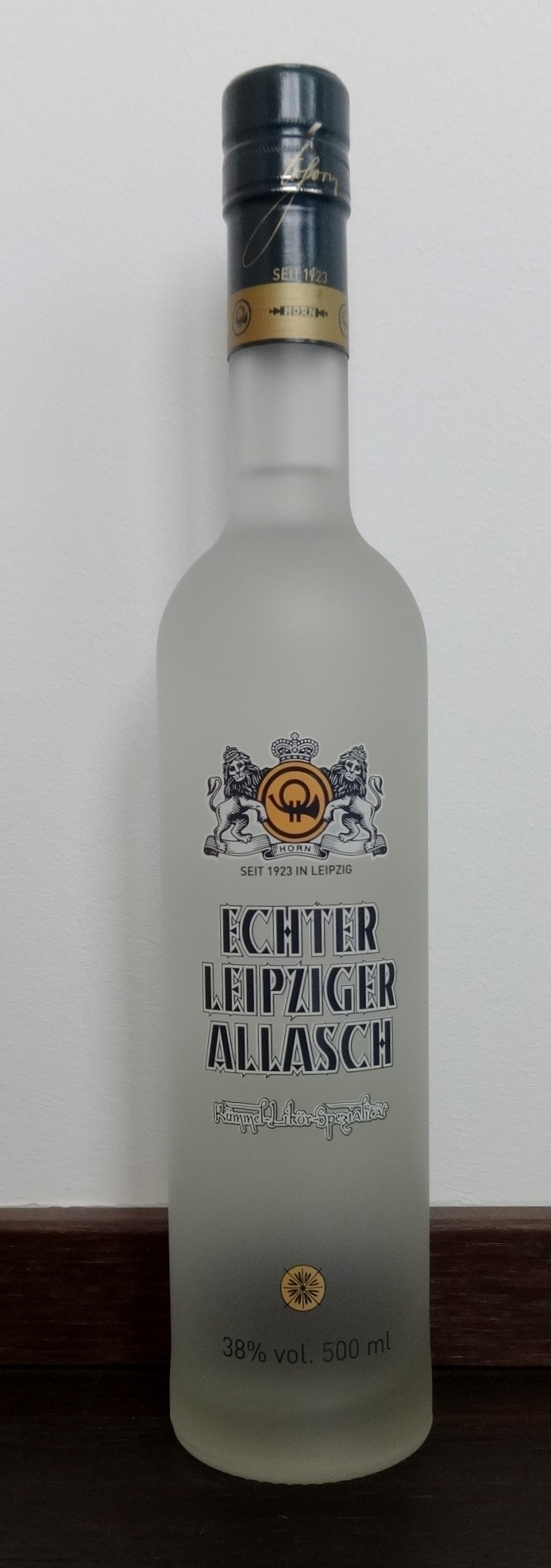 Vorderseite des Echten Leipziger Allasch, 0,5l-Flasche